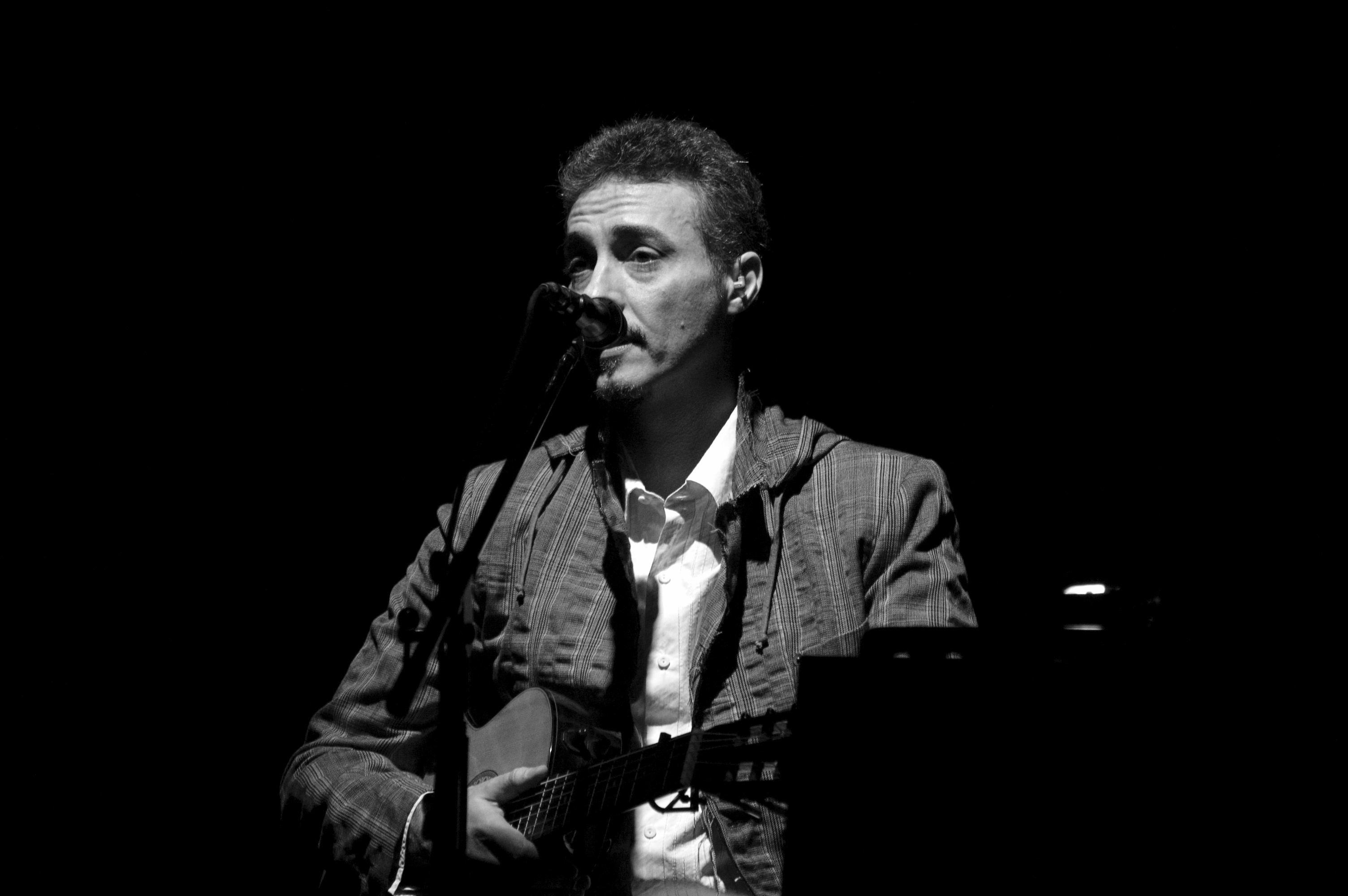 Foto de Pedro Aznar captada en uno de los recitales que dio en el teatro oriente en Santiago de Chile